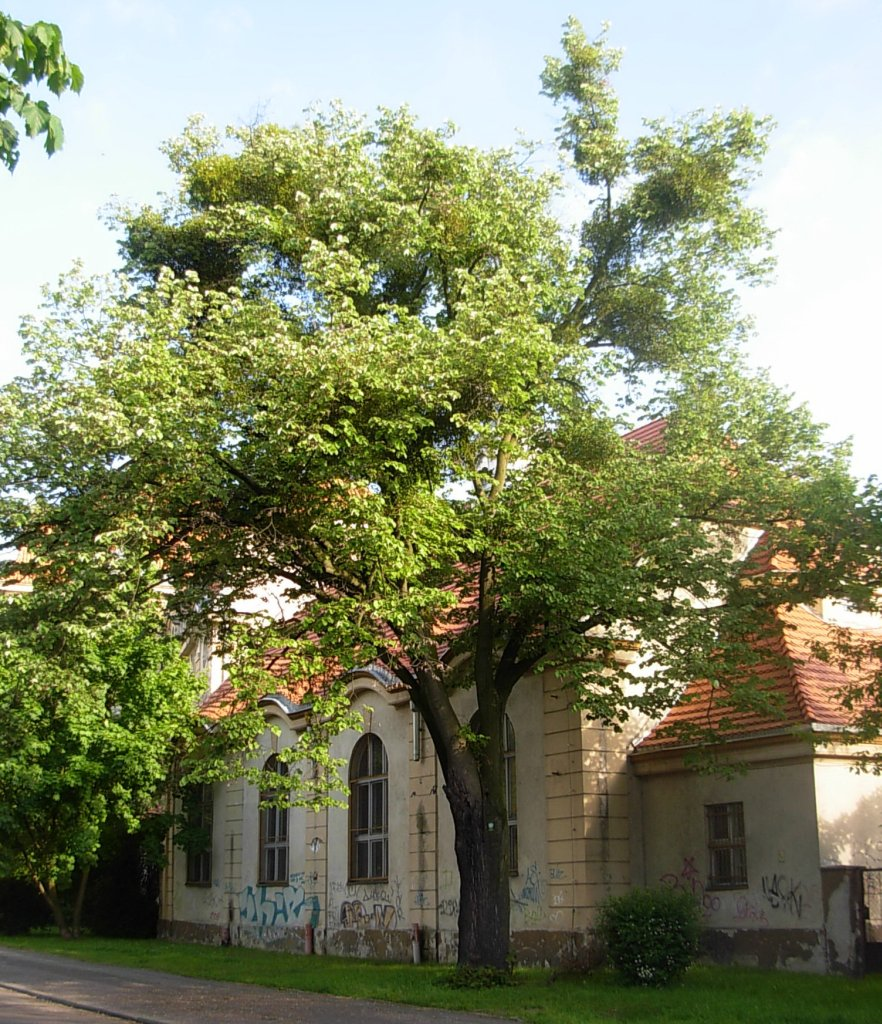 Lipa srebrzysta pomnik przyrody przy budynku VI LO w Bydgoszczy